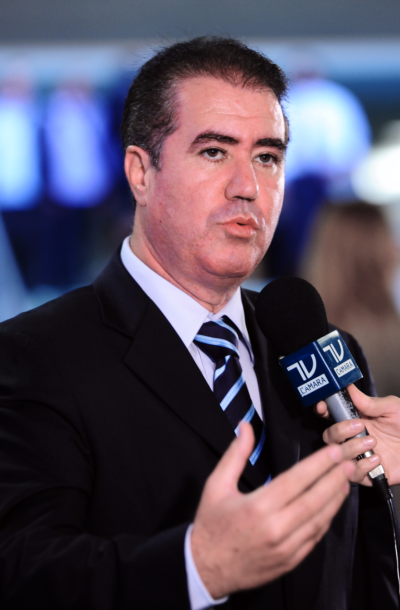 Jonas Donizette (PSB-SP), então Deputado Federal, concedendo entrevista à TV Câmara em 17 de maio de 2011.